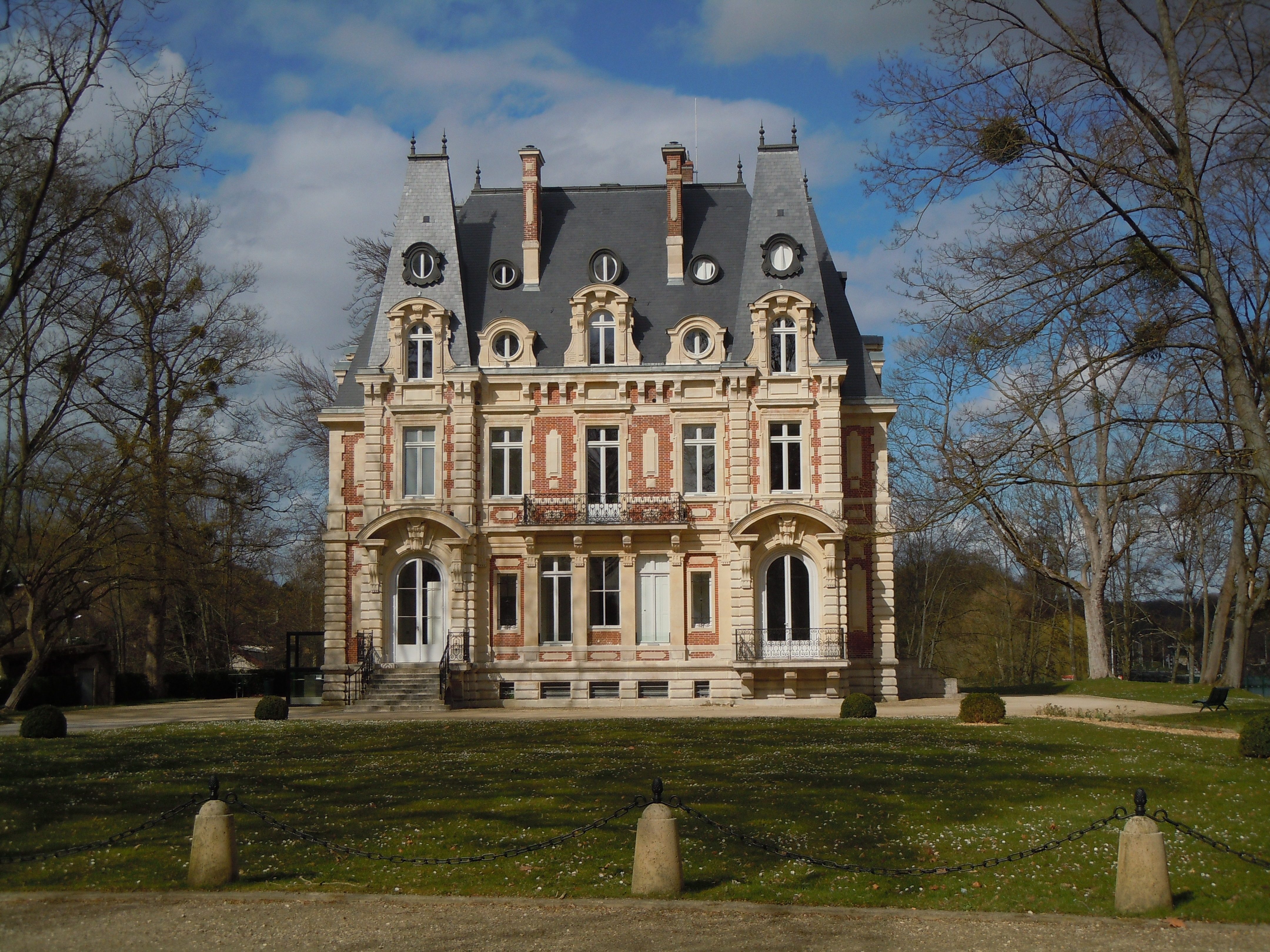 Château Conti